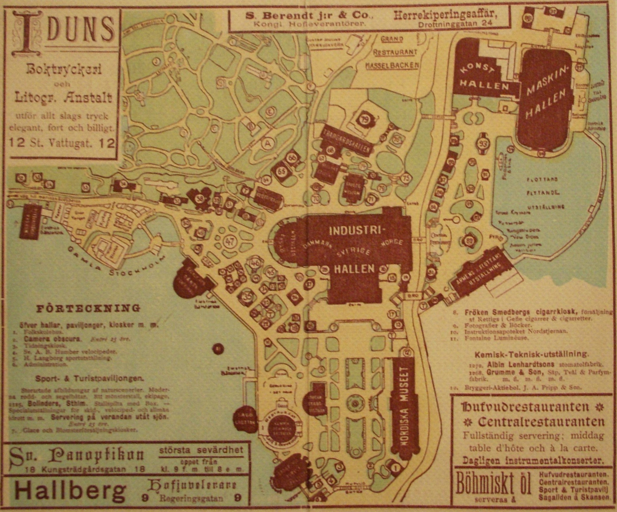 Översiktsplan över utställningsområdet för Stockholmsutställningen 1897